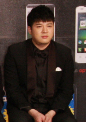 LG전자는 26일 저녁 대만 카오슝市에 위치한 '카오슝 아레나(Kaohsiung Arena)'에서 1만3천여 명의 관객이 운집한 가운데 열린 CJ주관 'M Live 콘서트'를 공식 후원했다. 콘서트에 앞서 공연장 인근 '샤또 데 신(CHATEAU de CHINE)' 호텔에서 LG 스마트폰 사용 고객 200명을 특별 초청해 'LG 옵티머스 슈퍼주니어 팬미팅' 행사를 개최했다.